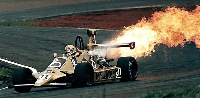 Incendio del Berta-Volkswagen de Néstor Gurini en Cascavel 1986.